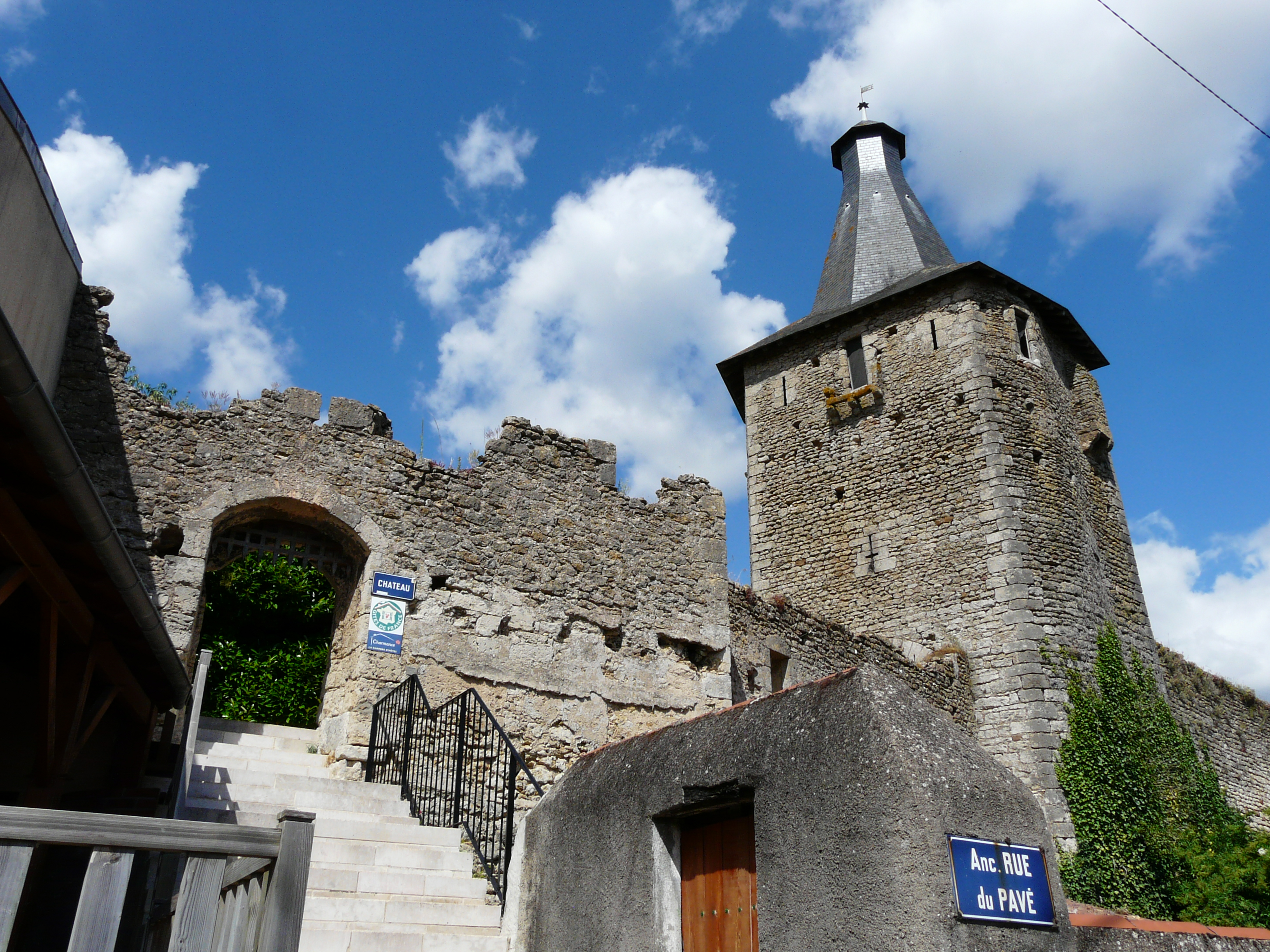 Tour-porte du château d'Airvault, Deux-Sèvres, France